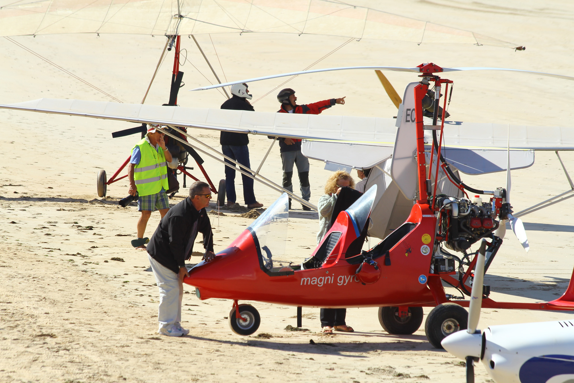 VI Certamen Aeronáutico de Nigrán, celebrado en la playa de Panjón el 1 de septiembre de 2012. Durante ese evento también se hizo el Campeonato Gallego de ULM 2012. Nigrán Aeronautical Contest VI Nigrán Aeronautical Contest VI, held on the beach of Panjón on September 1, 2012. During that event also became ULM Galician Championship 2012.